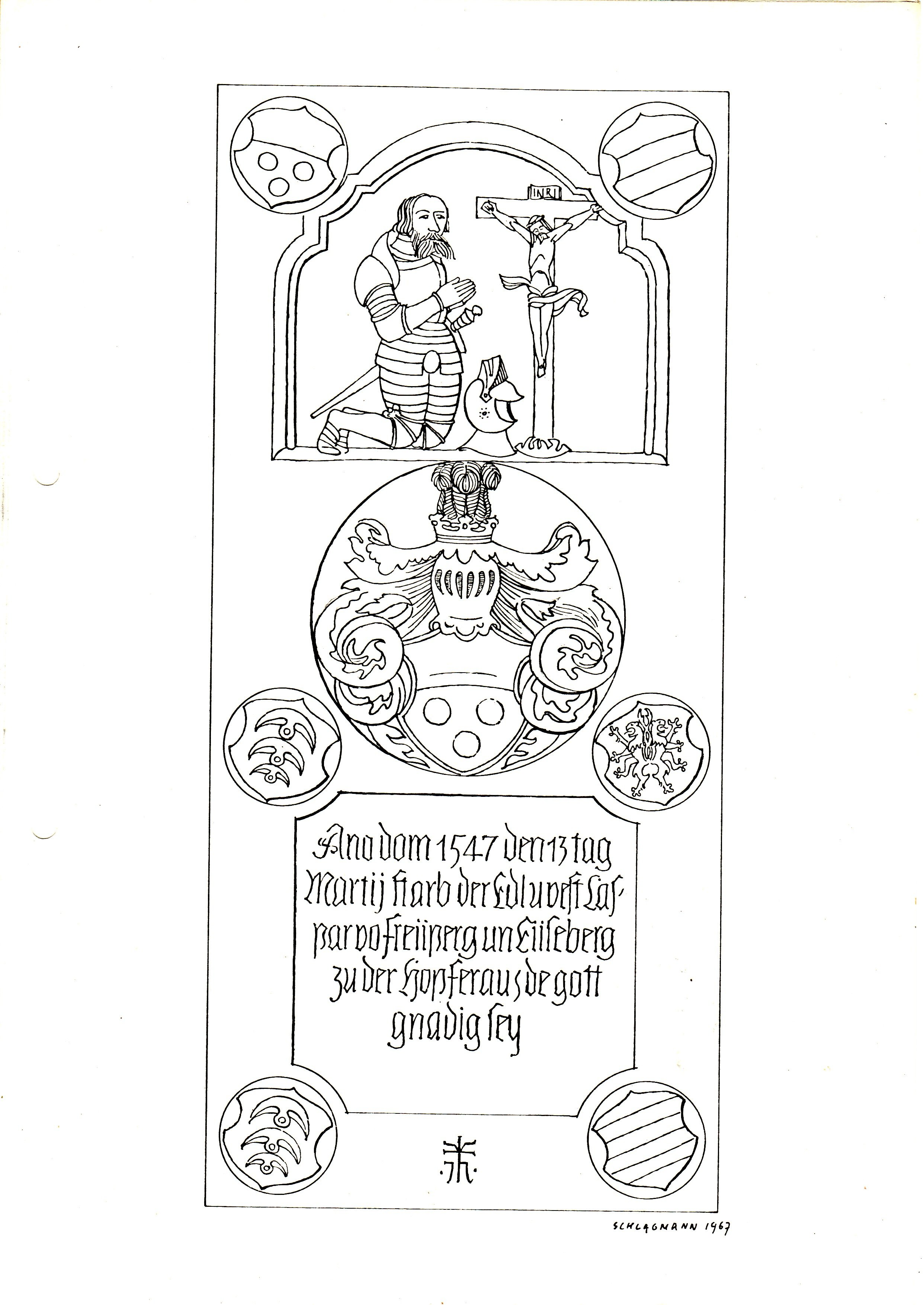 Epitaph für Kaspar von Freyberg-Eisenberg zu Hopferau in der St. Anna-Kapelle in Füssen